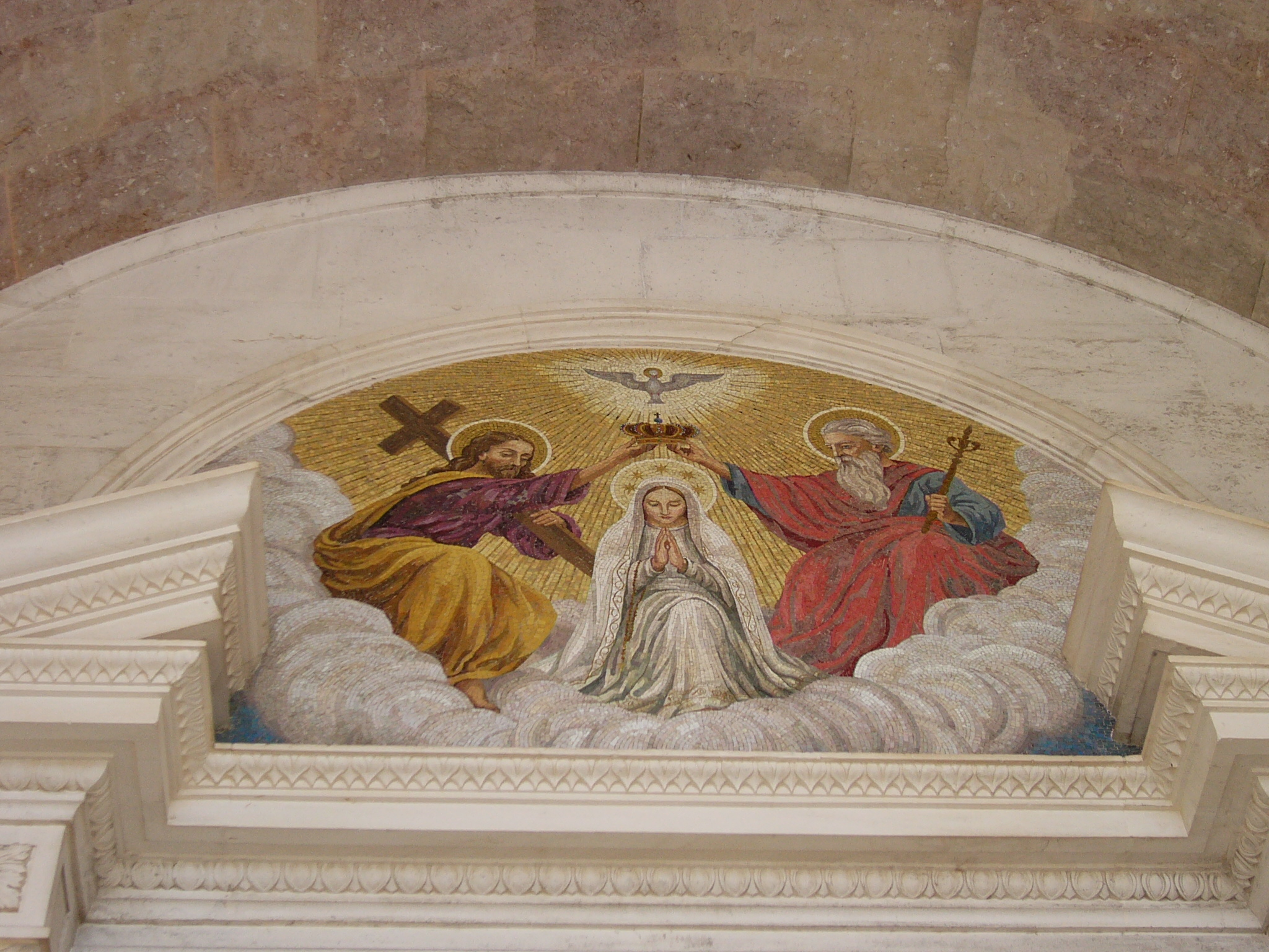 Fresco en la Iglesia de la Santísima Trinidad en Fátima. Foto de Manuel González Olaechea y Franco ©